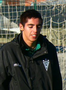 Fotografía de Gabriel Castellón, jugador del Santiago Wanderers de Valparaíso, club de fútbol de la Primera División de Chile